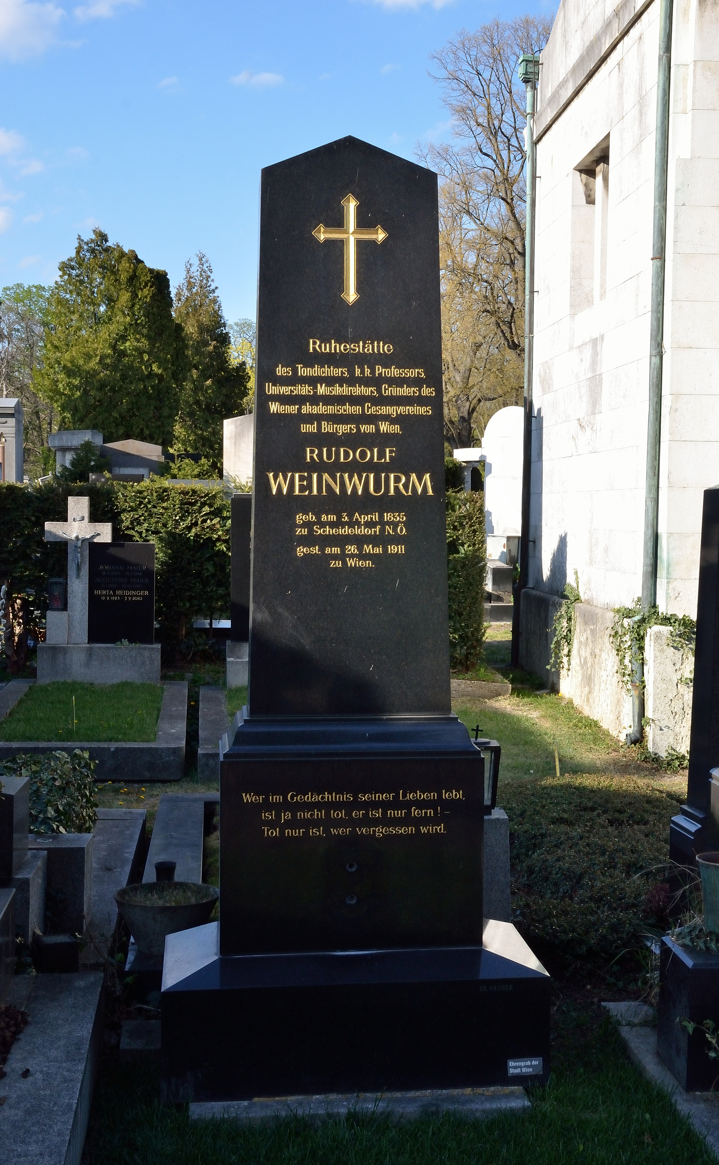 Das Grabmal für Rudolf Weinwurm liegt auf dem Hietzinger Friedhof, Gruppe 25, Nr. 3.